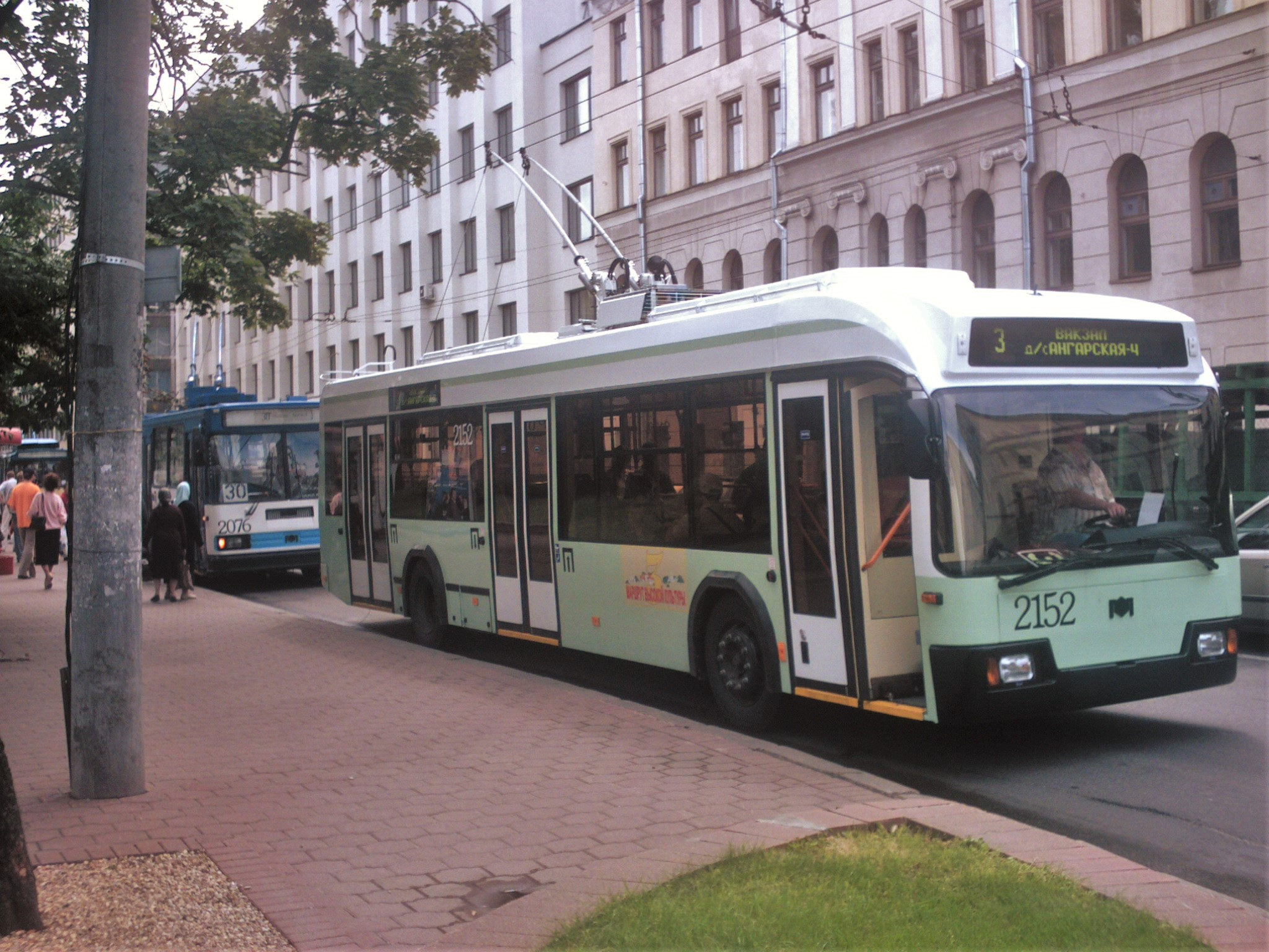 Беларуская (тарашкевіца): Тралейбус AKCM-321.